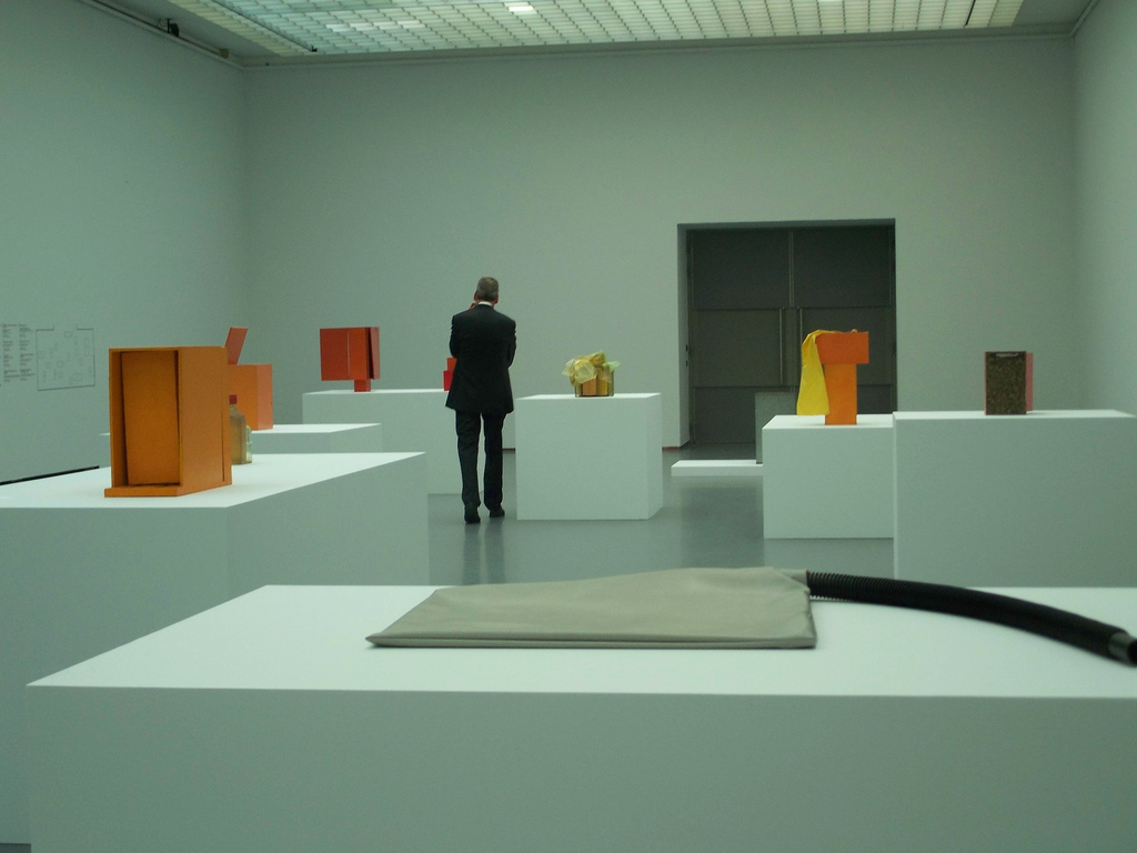 De Bólides (vuurballen) waren zo geconstrueerd dat de beschouwer ze kon manipuleren om zelf variaties in vorm en kleur te ervaren. Ze zijn daar nu helaas te kwetsbaar voor.